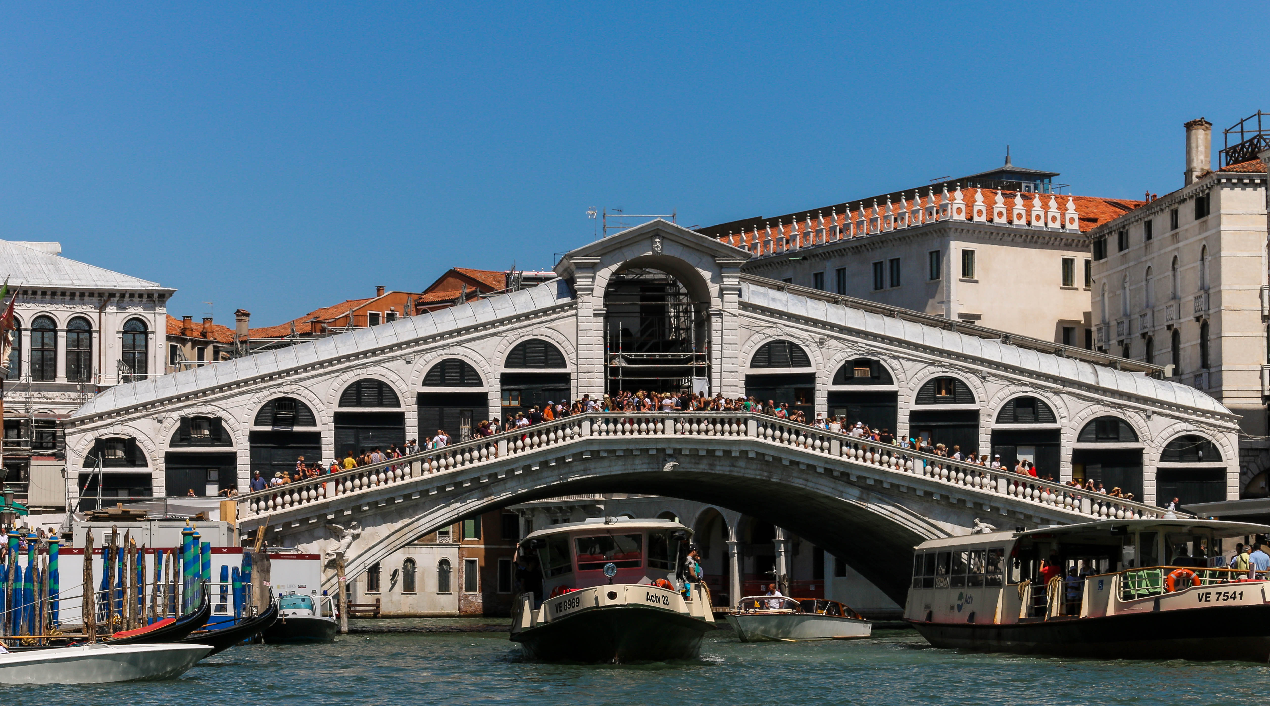 Rialtobrücke